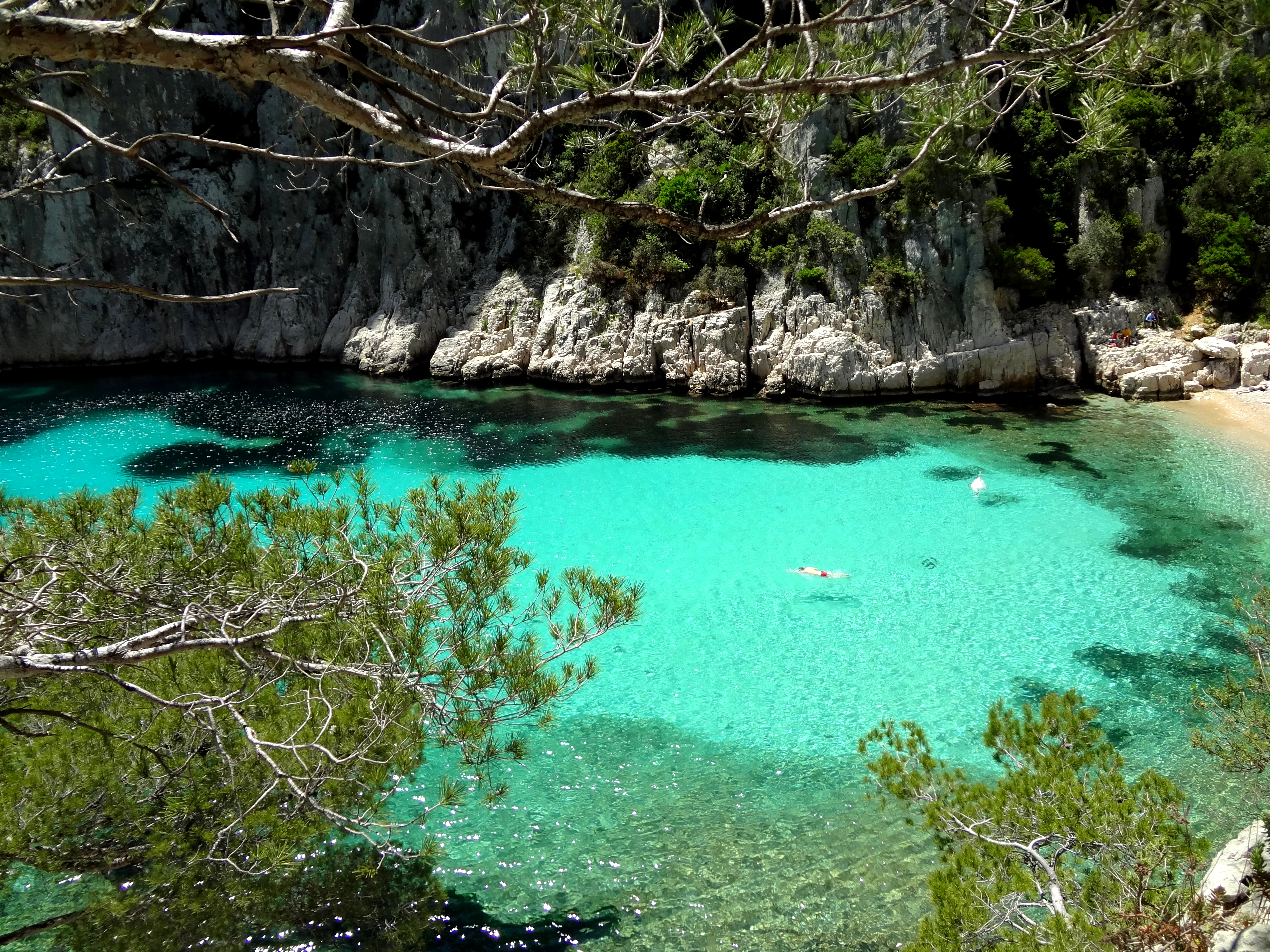 parc national des calanques